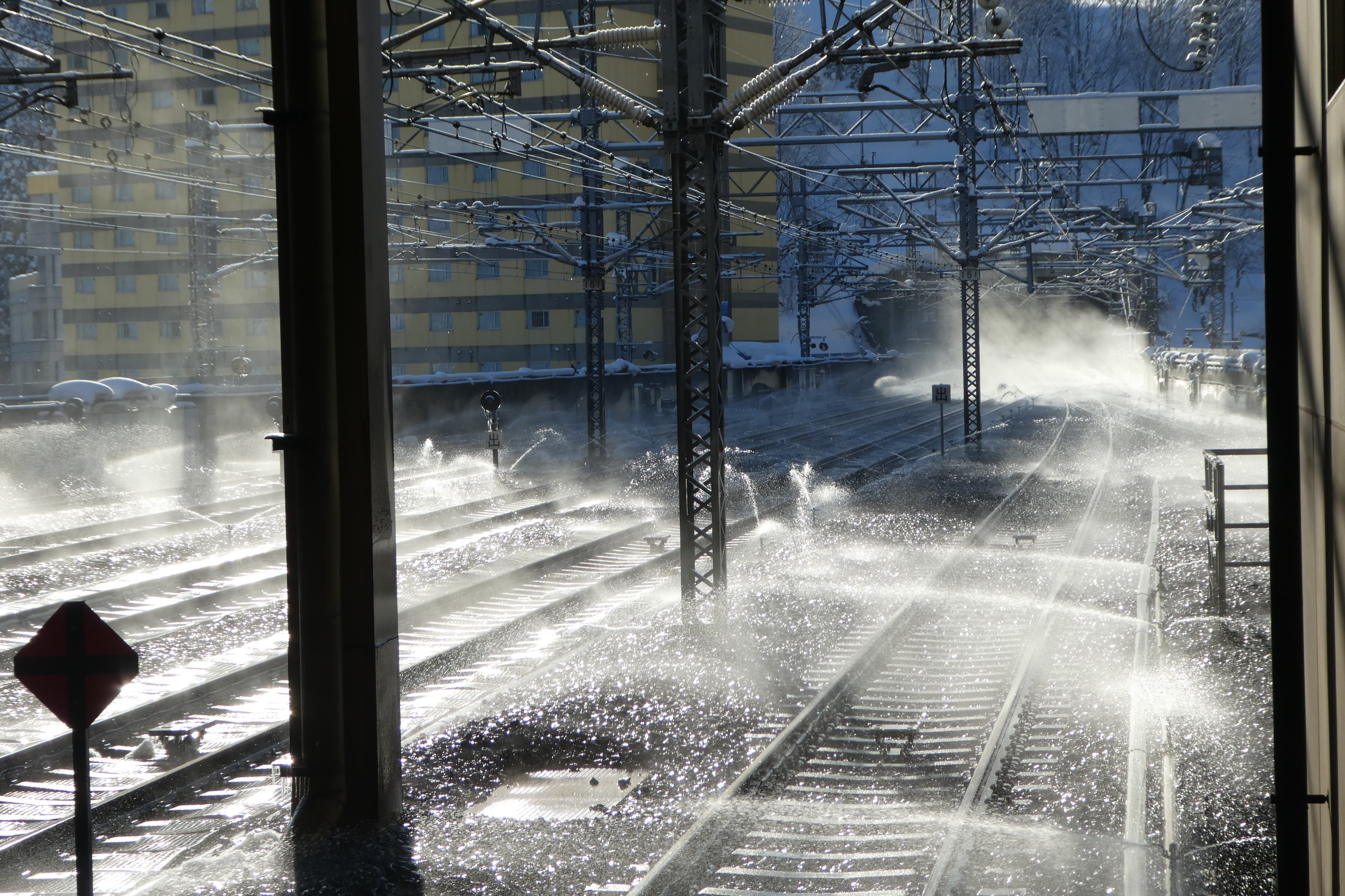 上越新幹線越後湯沢駅の新幹線下りホームから東京側の線路を撮影。左に写っている黄色の建物は、ホテルスポーリア湯沢。